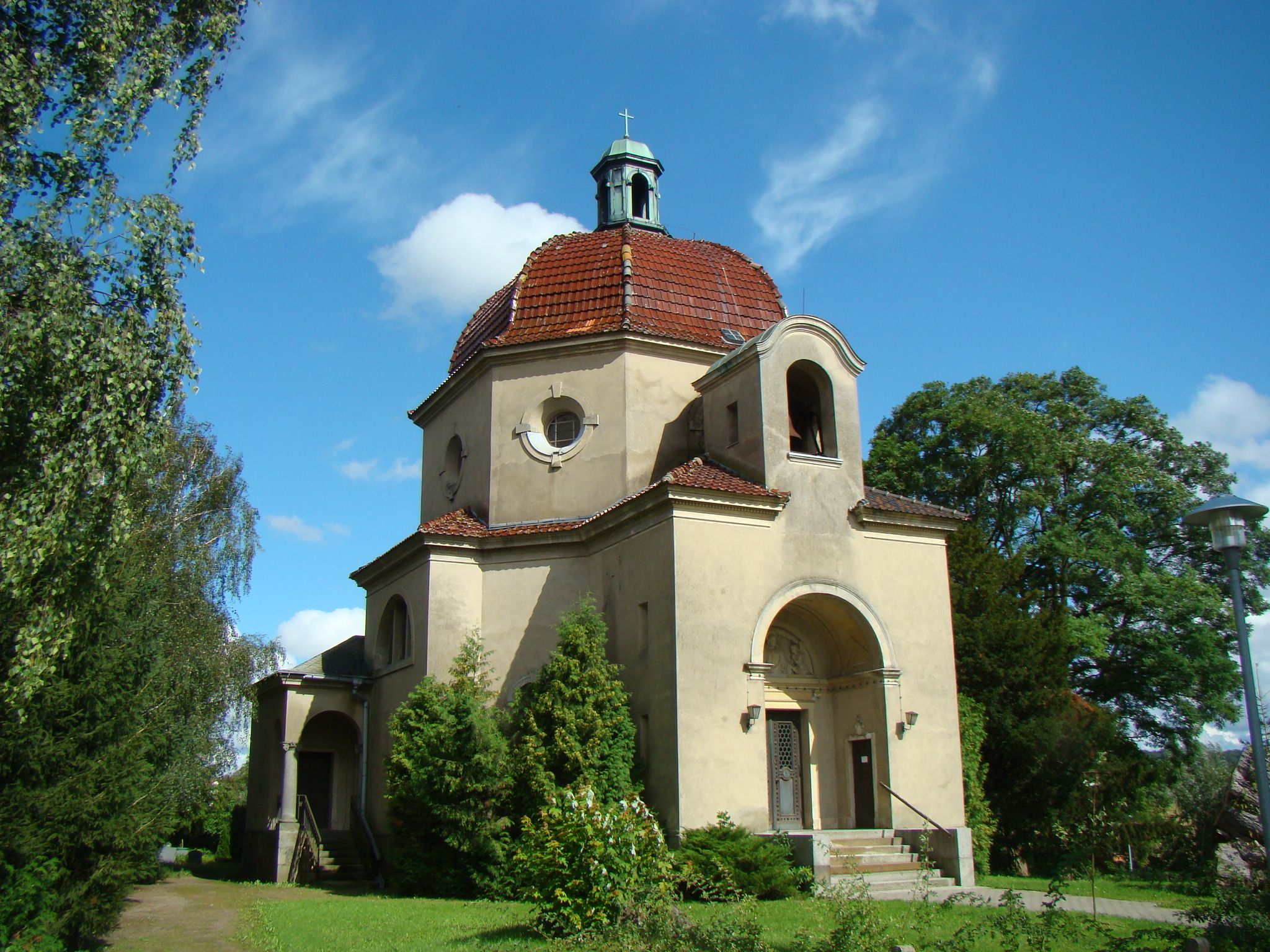 Kirche in Groß Plasten. Foto: Peter Schmelzle 2011.